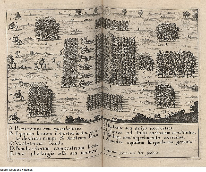 Original image description from the Deutsche Fotothek Militärwesen & Schlachtenordnung & Phalanx